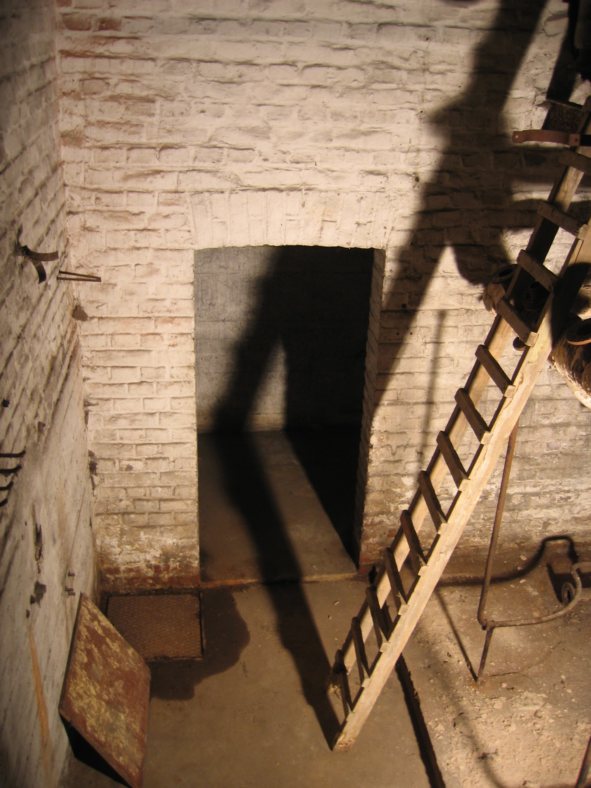 Tiefbunker am ehemaligen Hitlerjugend-Wohnheim in Köln-Poll